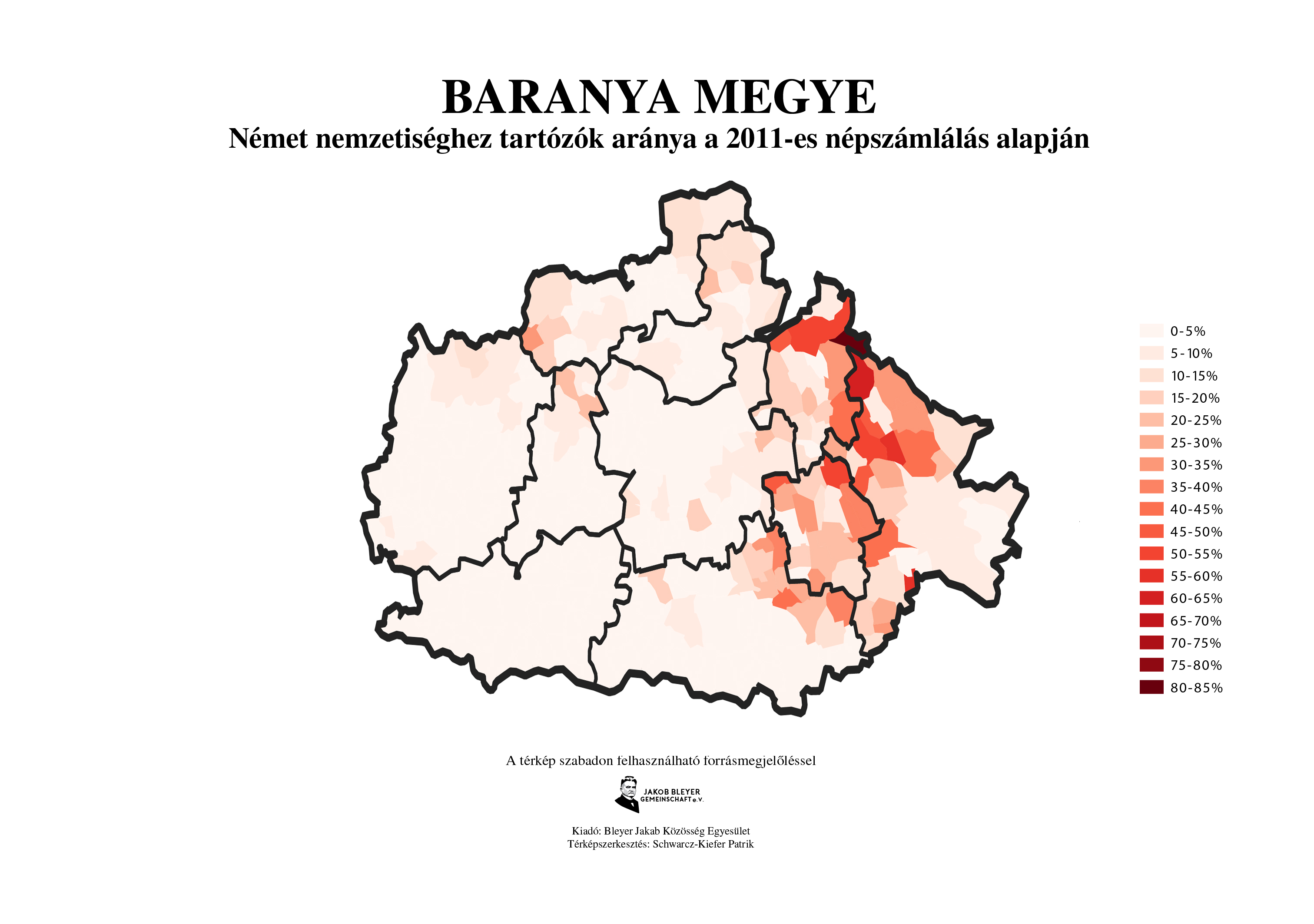 Magyarországi németséghez tartozók földrajzi eloszlása Baranya megyében